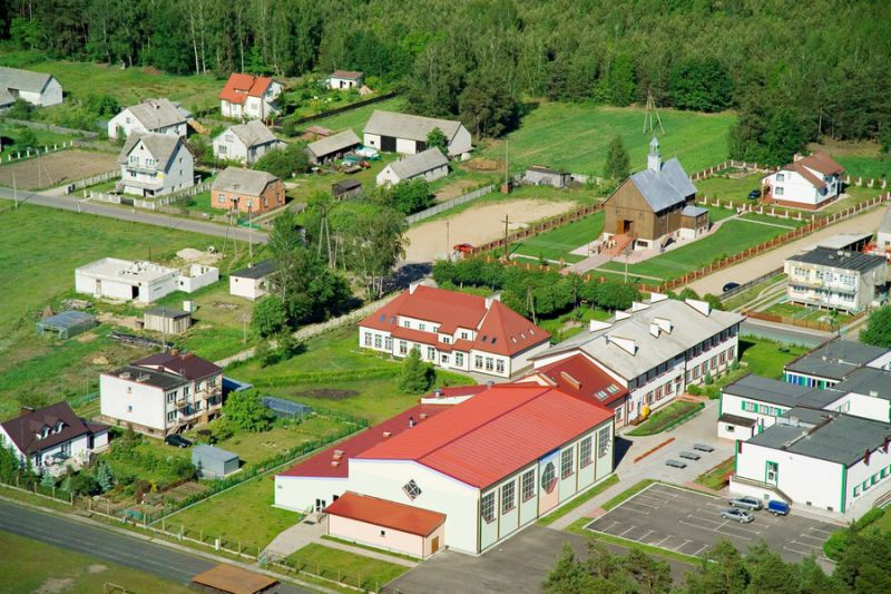 Lelis